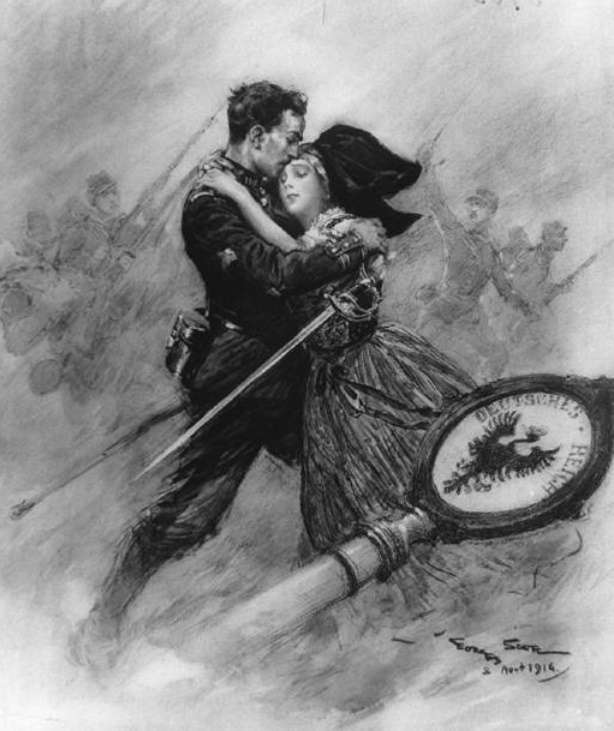 Dessin de Georges Scott titré « En Alsace ! Le vrai plébiscite », publié dans L'Illustration du 15 août 1914.